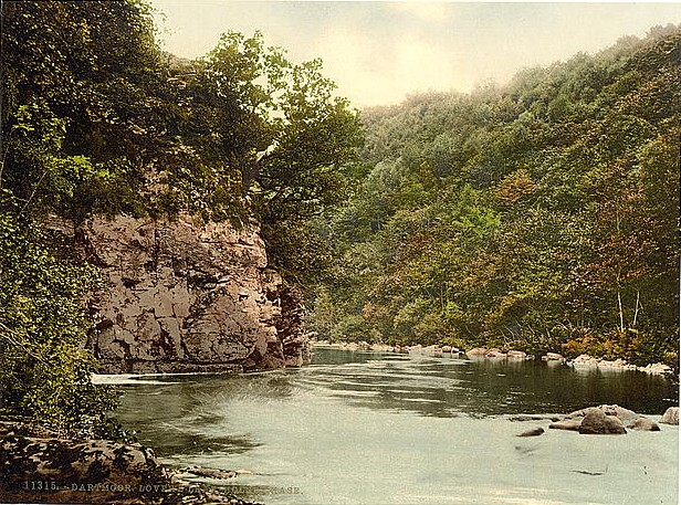 Dartmoor - Lover's Leap (Kongressbibliothek) TITLE: [Lovers leap, Holne Chase, Dartmoor, England] CALL NUMBER: LOT 13415, no. 286 [item] [P&P] Find any corresponding online LOT(group) record REPRODUCTION NUMBER: LC-DIG-ppmsc-08264 (digital file from original) No known restrictions on publication. MEDIUM: 1 photomechanical print : photochrom, color. CREATED/PUBLISHED: [between ca. 1890 and ca. 1900]. NOTES: Title from the Detroit Publishing Co., Catalogue J--foreign section, Detroit, Mich. : Detroit Publishing Company, 1905. Print no. "11315". Forms part of: Views of England in the Photochrom print collection. FORMAT: Photochrom prints Color 1890-1900. PART OF: Views of England REPOSITORY: Library of Congress Prints and Photographs Division Washington, D.C. 20540 USA DIGITAL ID: (original) ppmsc 08264 CARD #: 2002696634